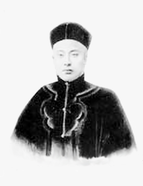 良弼，清朝官员